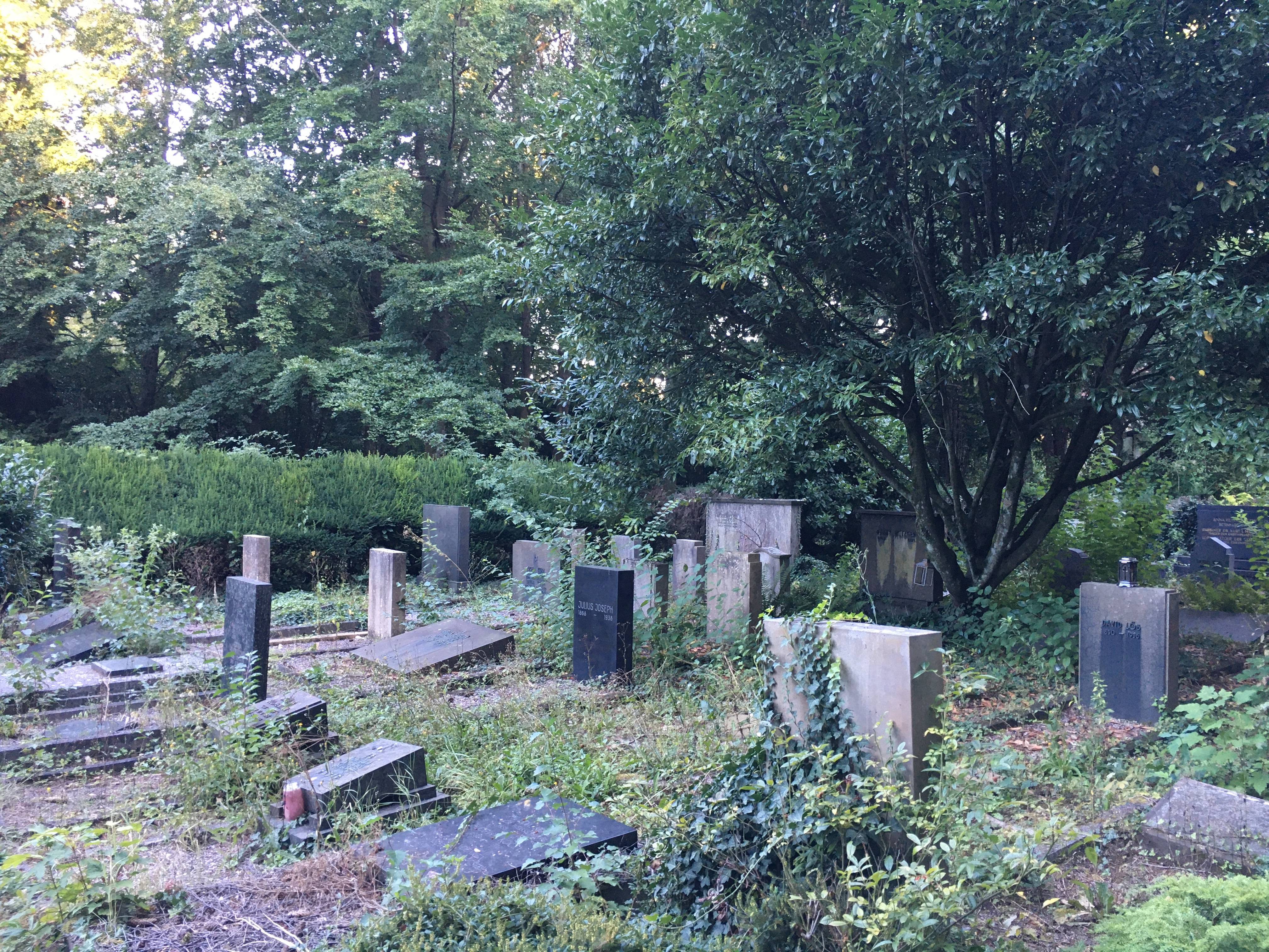 Jüdischer Friedhof